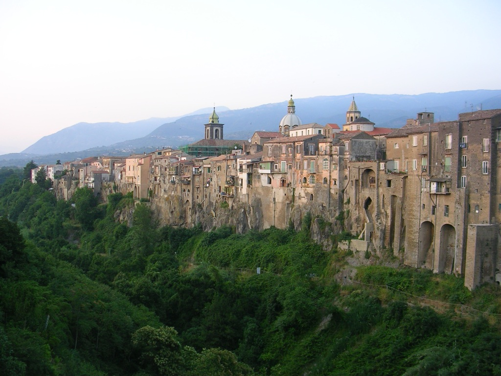 Sant'Agata de' Goti, Campania, Italia